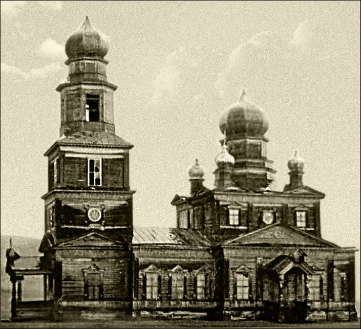 Храм в честь Богоявления Господня в селе Подвалье Шигонского района Самарской области. Храм деревянный, построен прихожанами в 1895 году, разрушен в 1953 году.